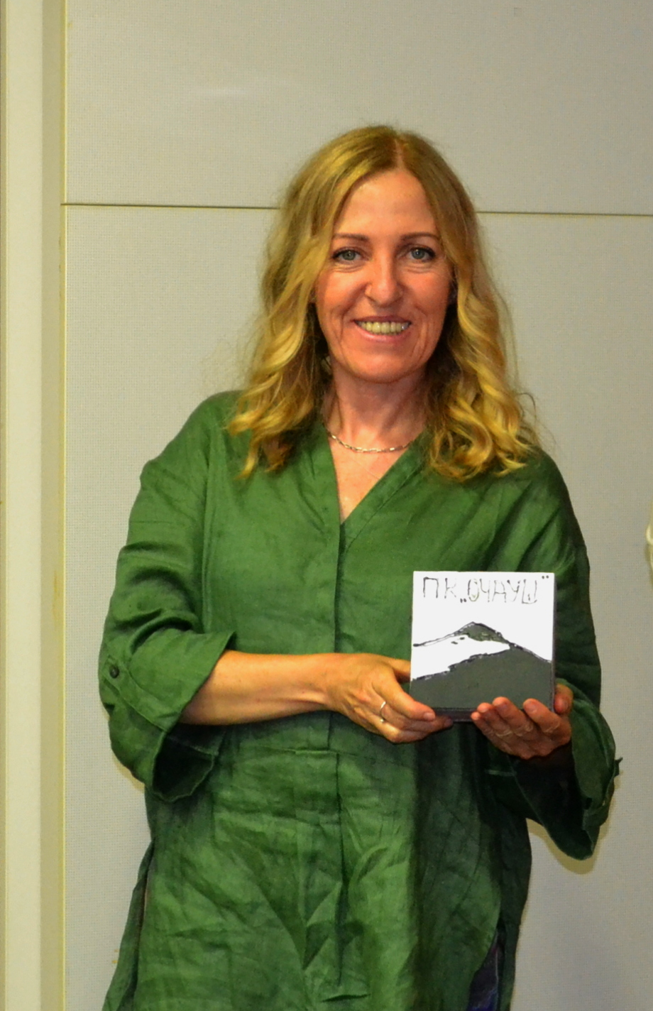 Драгана Рајбловић, српска планинарка